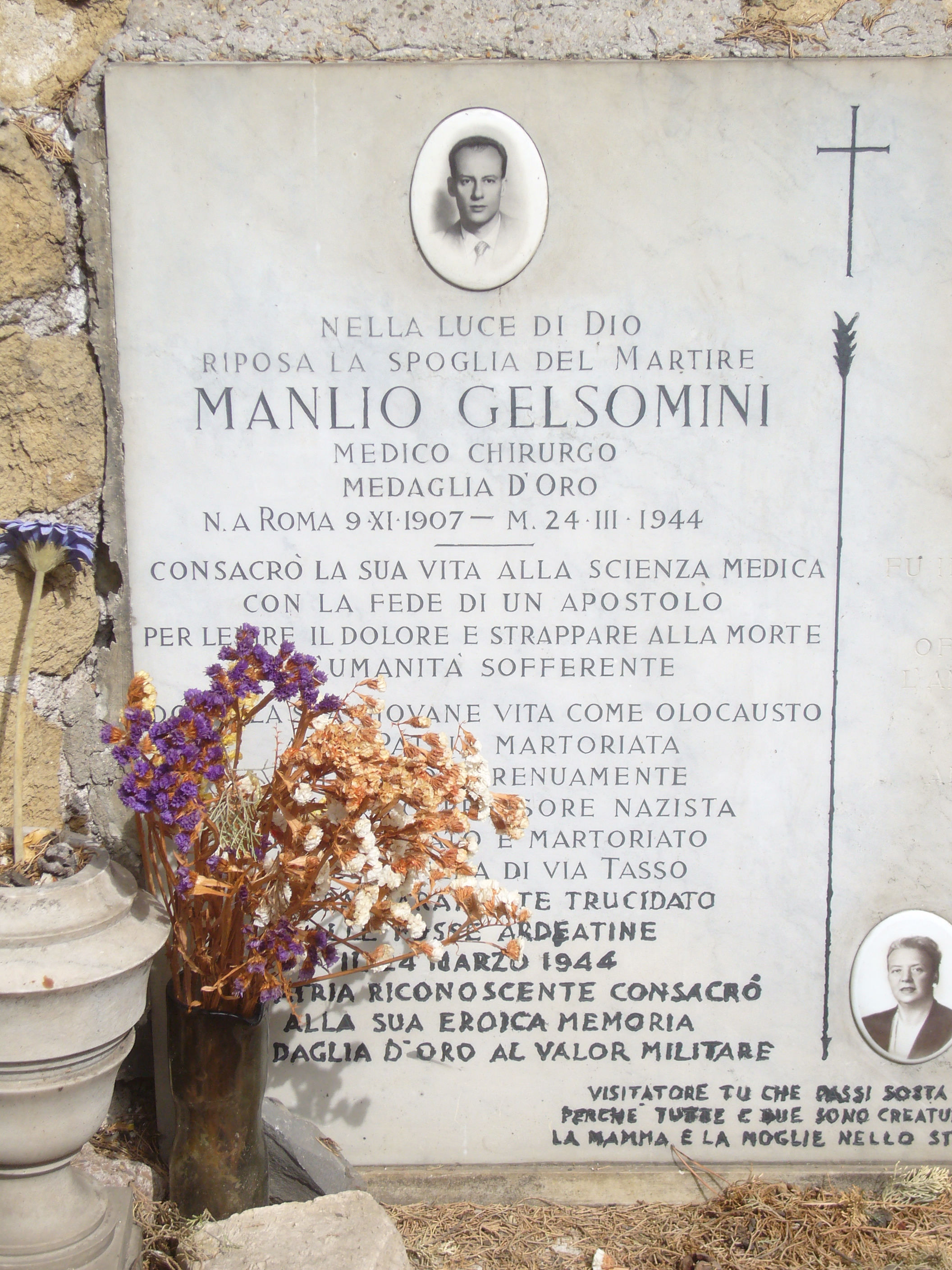 Roma, cimitero del Verano.